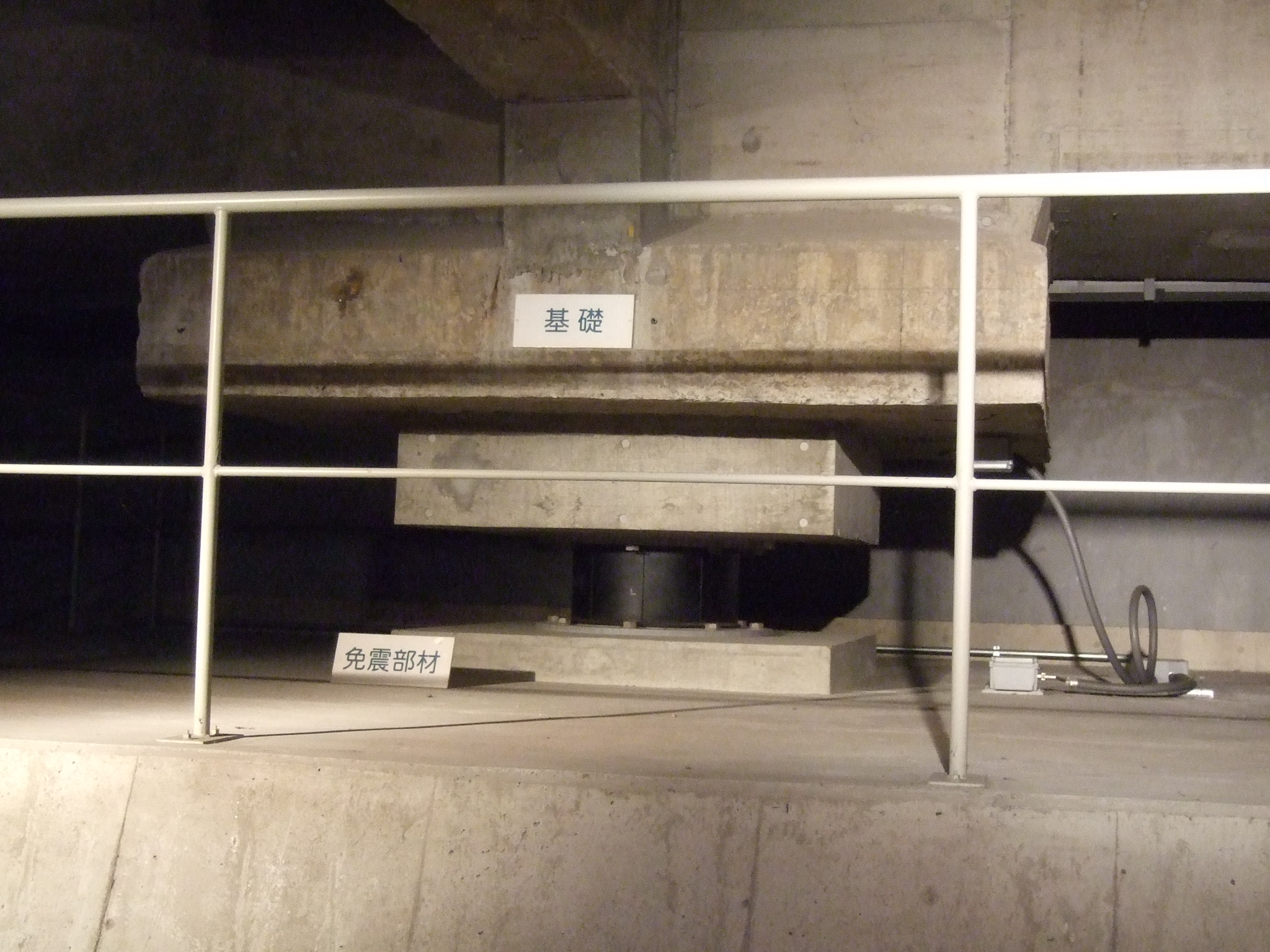 国立西洋美術館の免震装置